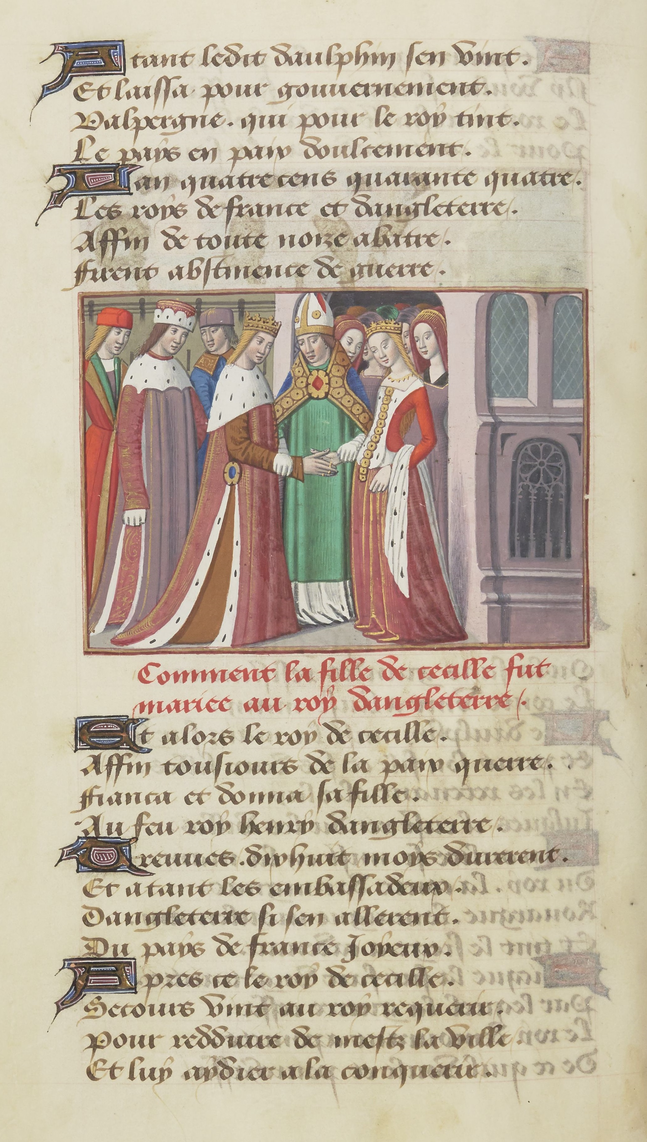 Mariage d'Henri VI et de Marguerite d'Anjou.